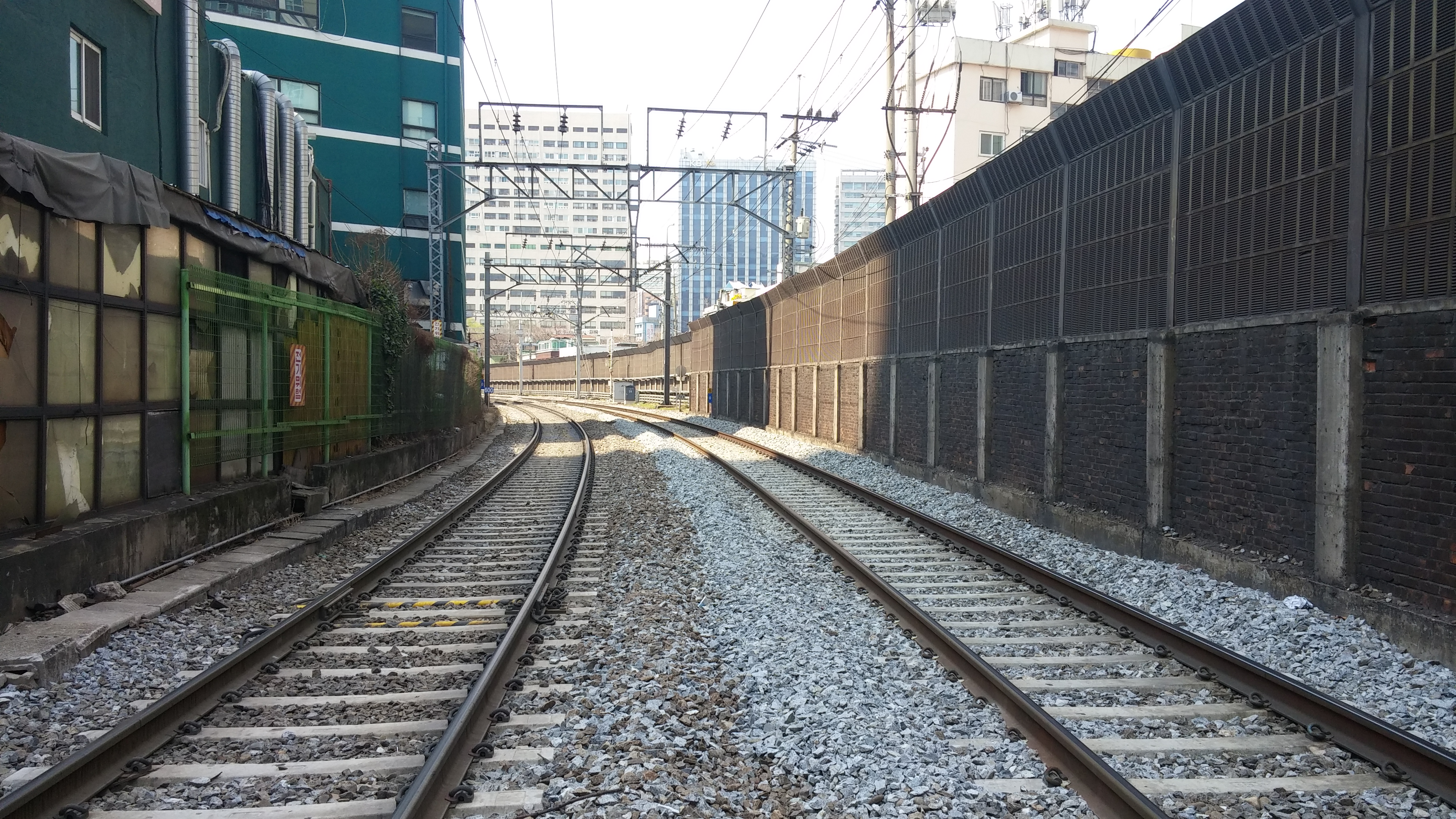 서대문고가도로 밑에서 찍은 경의중앙선